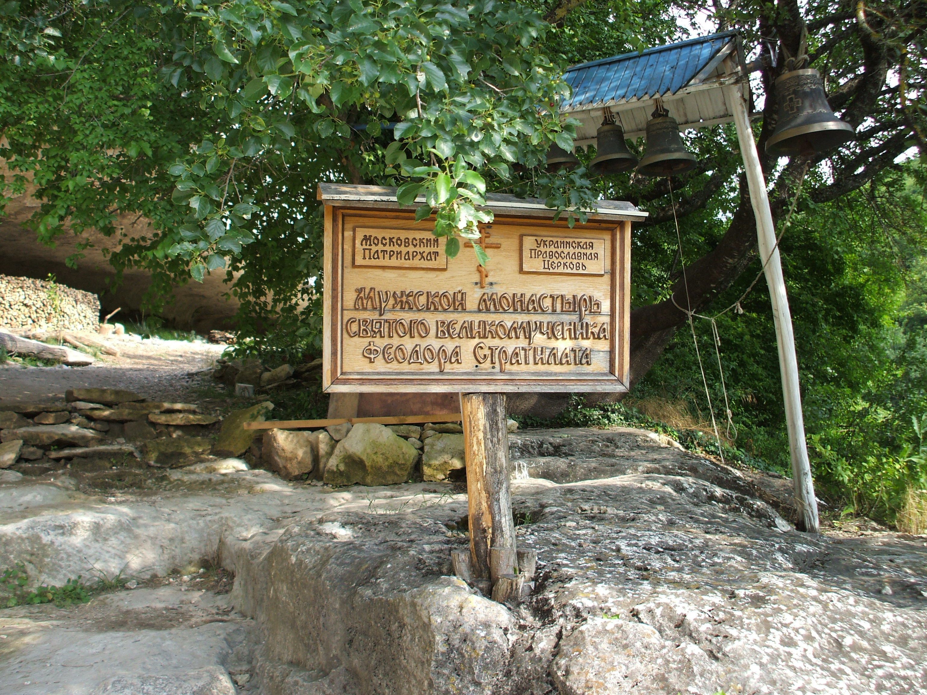 Вхід у печерний монастир Челтер-Коба